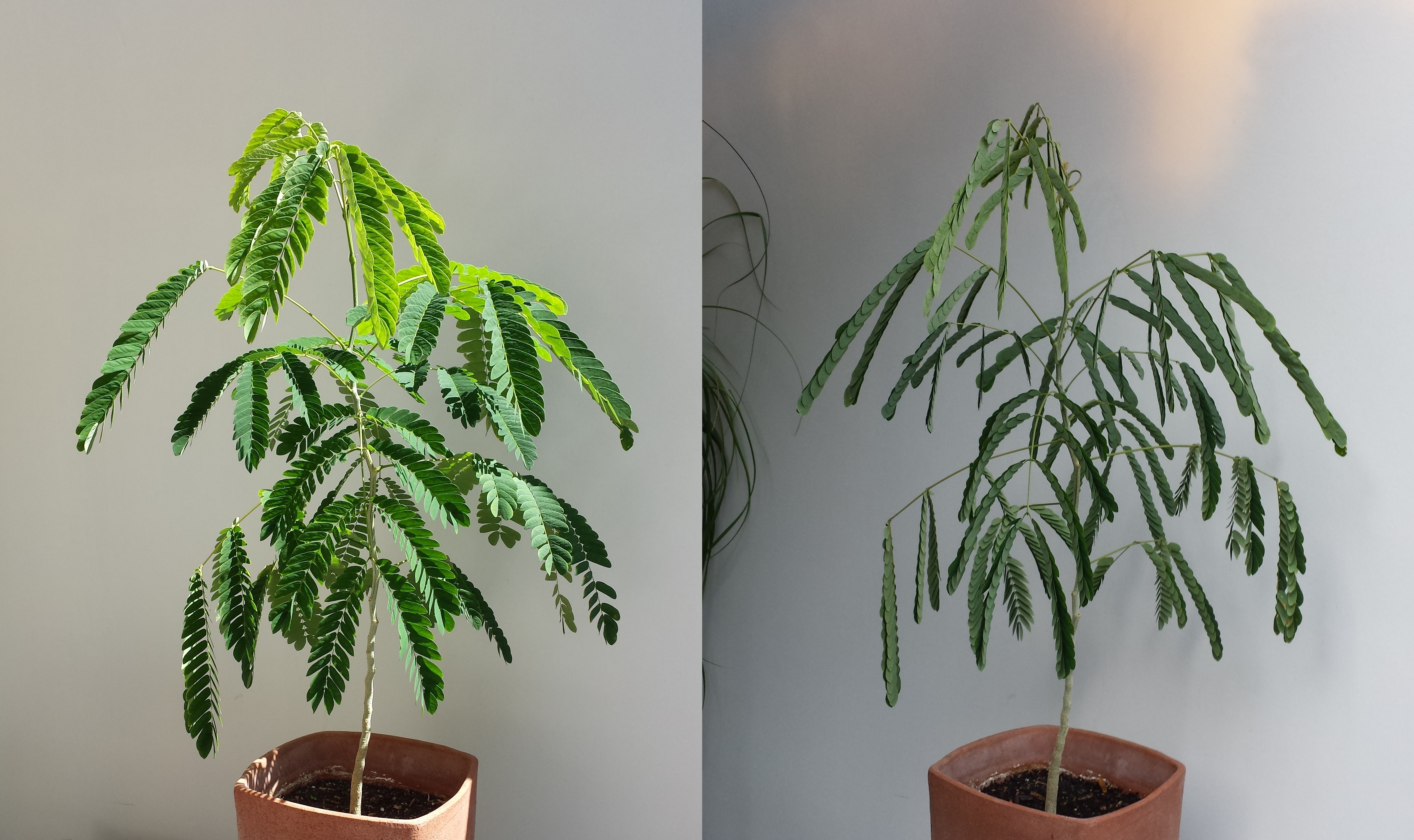 Jungpflanze des Seidenbaums (Schlafbaum) am Tag und in der Nacht, ein Jahr später Circadiane Rhythmik Circadian rhythm